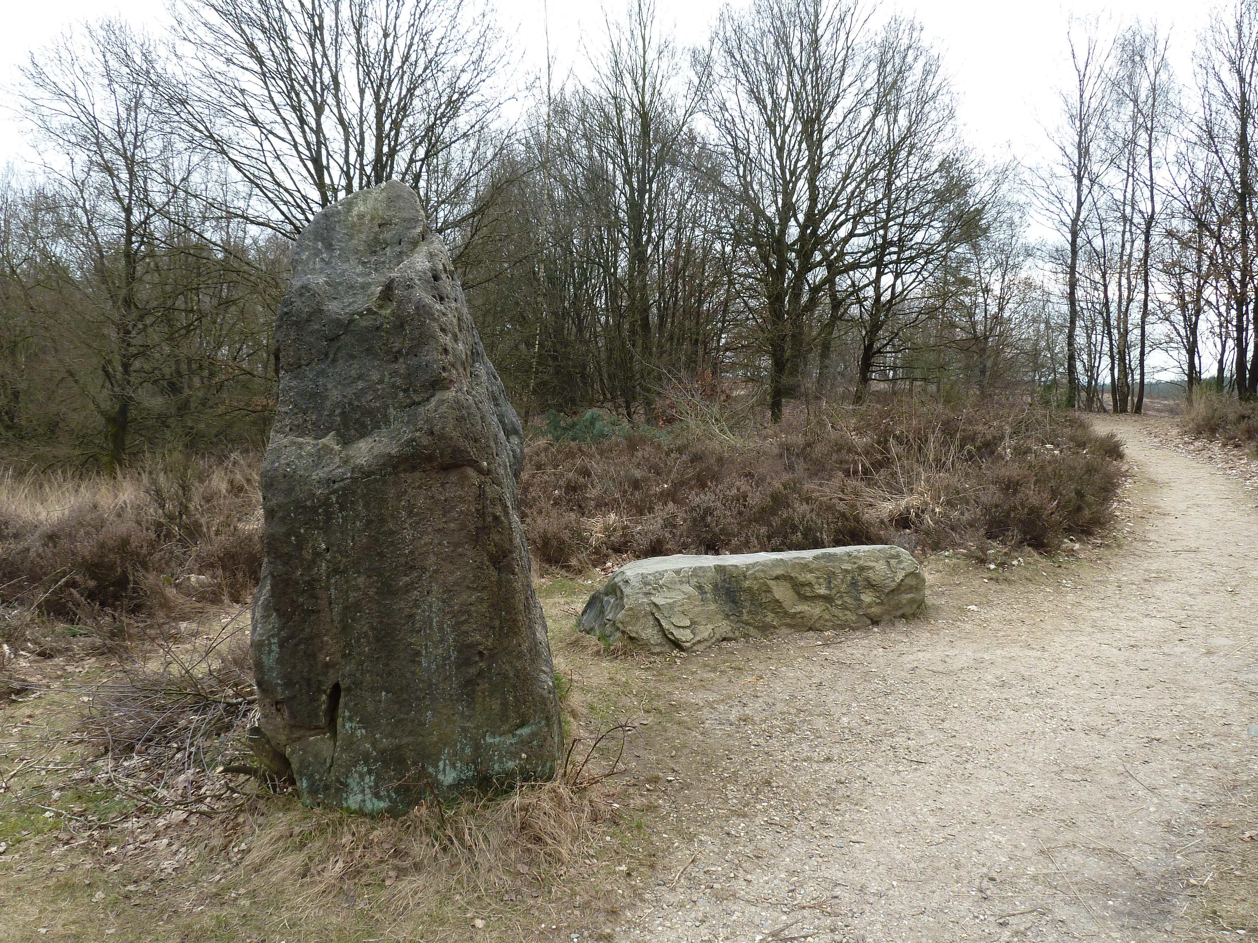 Stenen op de Mechelse Heide, Maasmechelen, Limburg, België